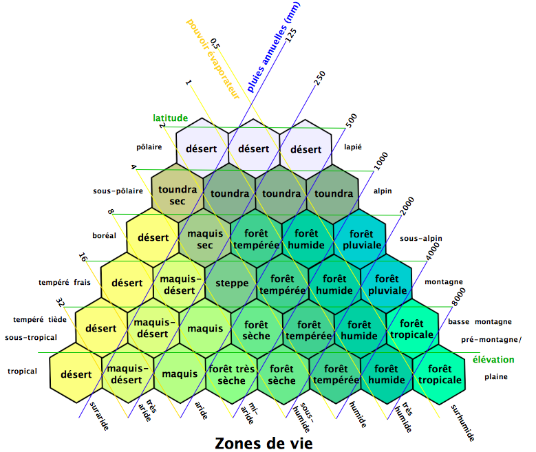 Zones de vie holdridgiennes